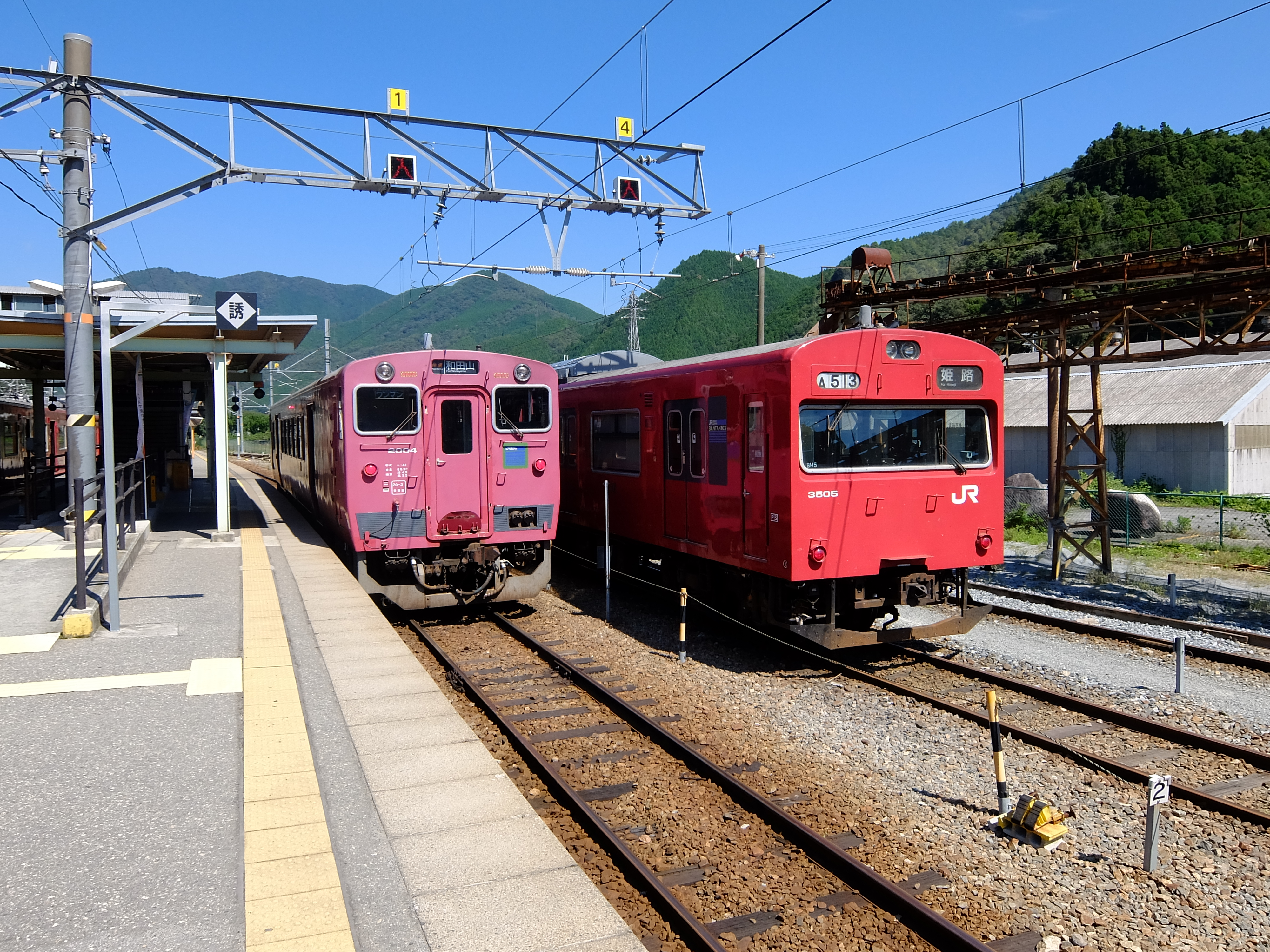 JR播但線 寺前駅